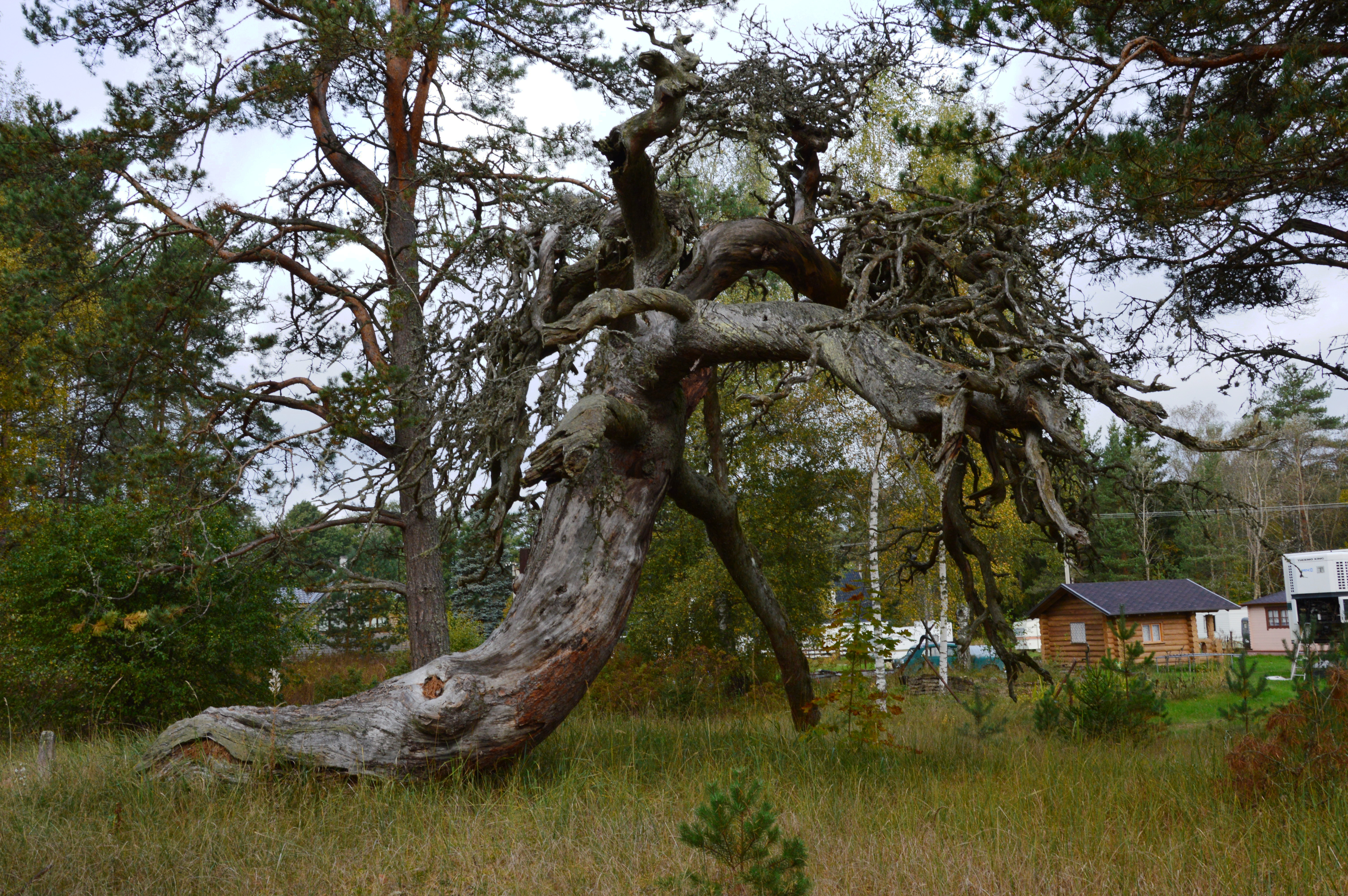 Kuru mänd